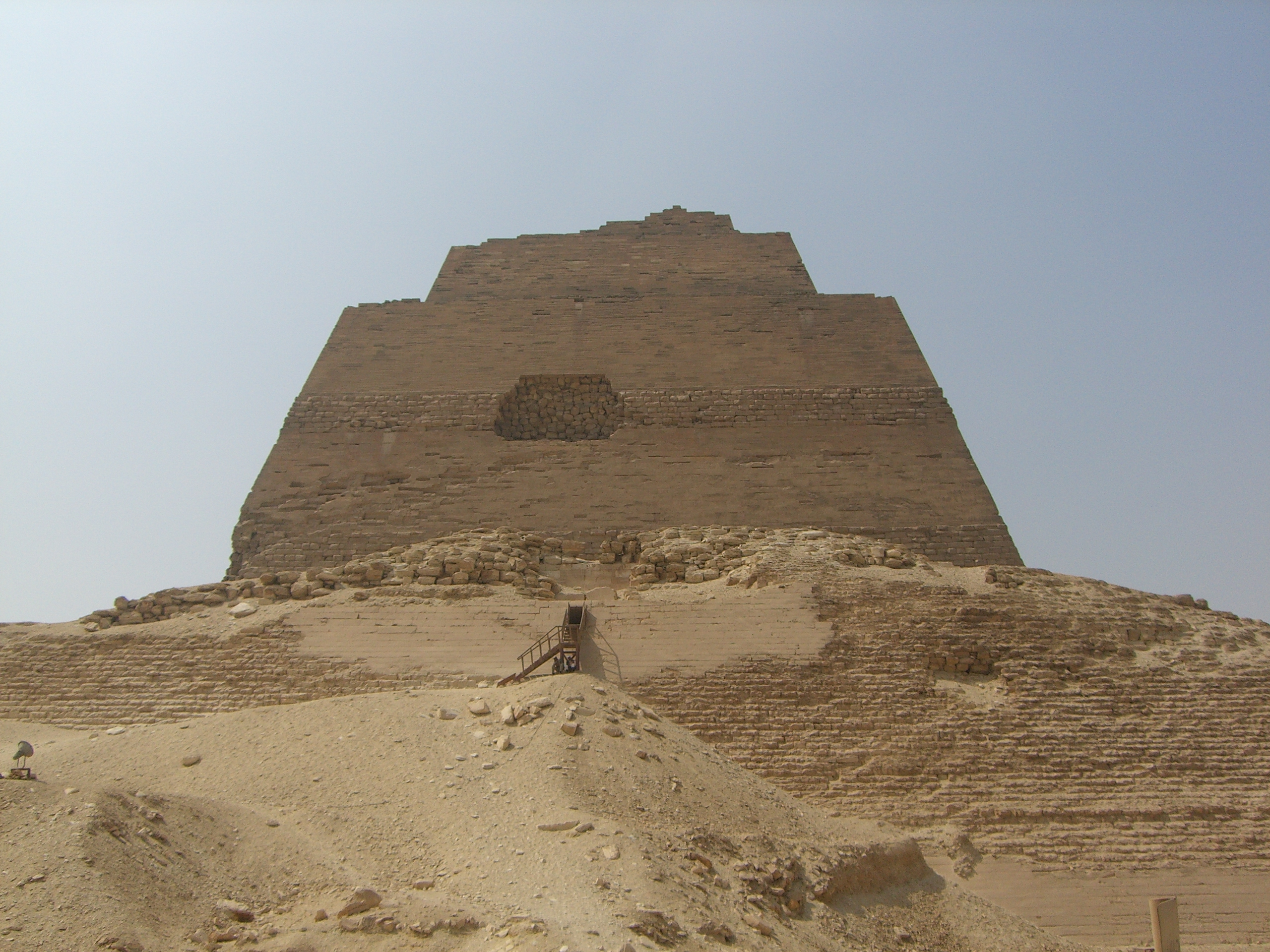 Vue de l'entrée sur la face nord de la pyramide de Meïdoum.